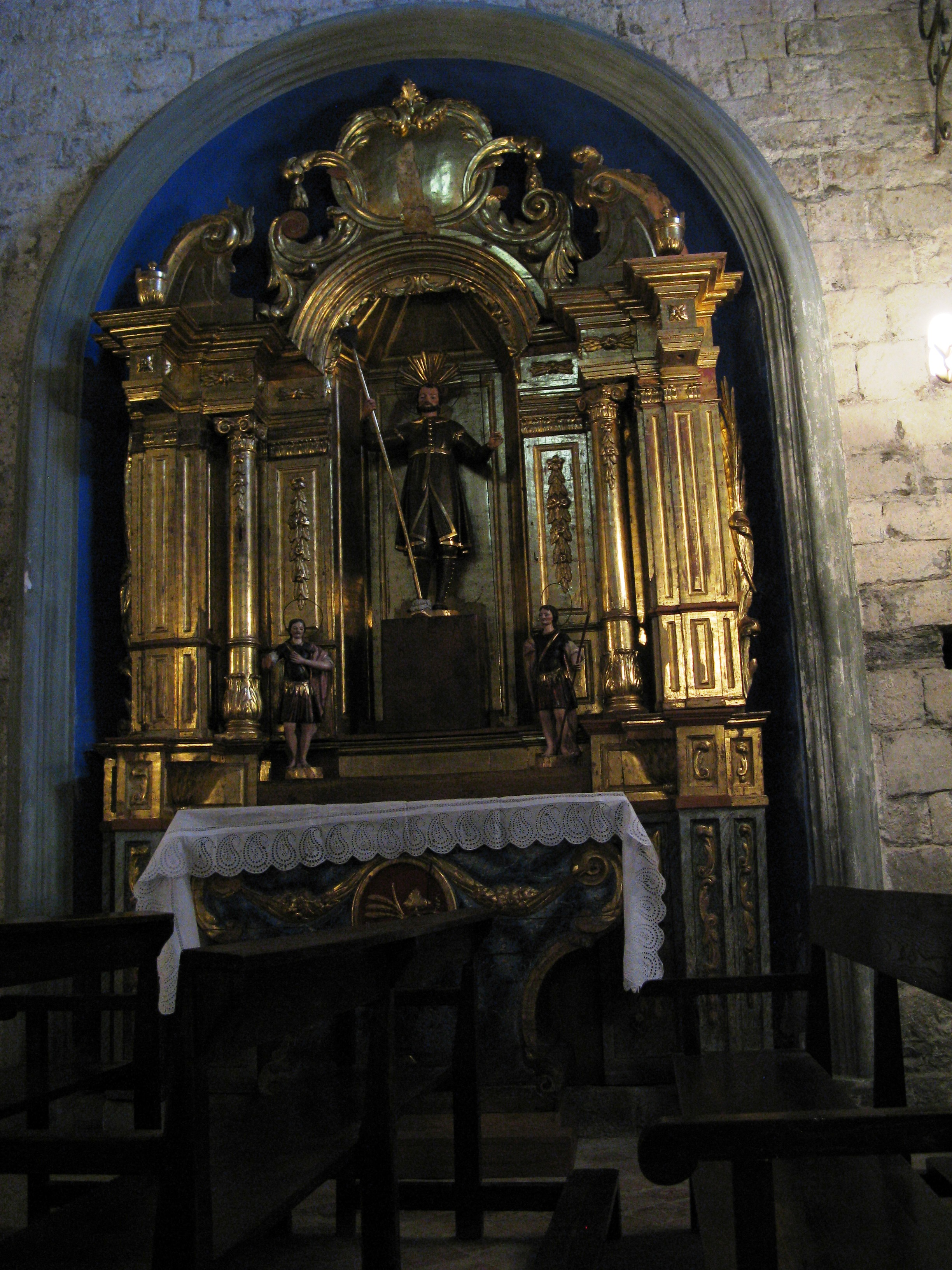 Seitenaltar von Sankt Galderic (Patron der Bauern in Katalonien) in der romanischen Kirche "Sant Cristòfor de Beget"